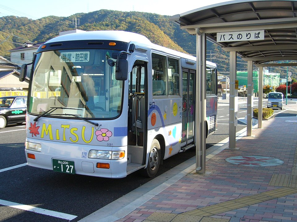 御津コミュニティバス（旧・御津町コミュニティバス） 金川駅前にて 中鉄バスが岡山市御津合併特例区から受託運行する